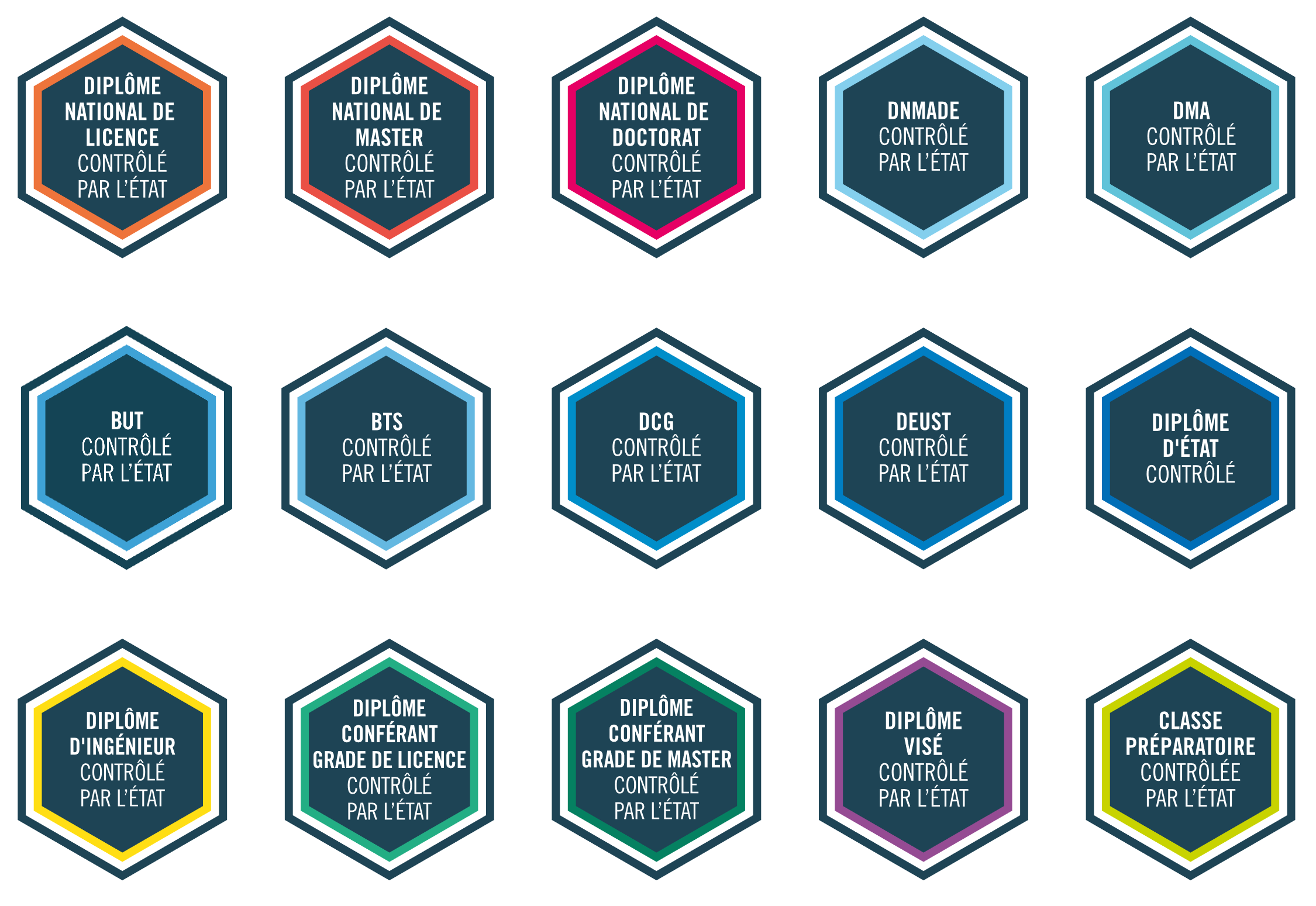 Image des différents logos créés par le Ministère de l'Enseignement Supérieur, de la Recherche et de l'Innovation (France)